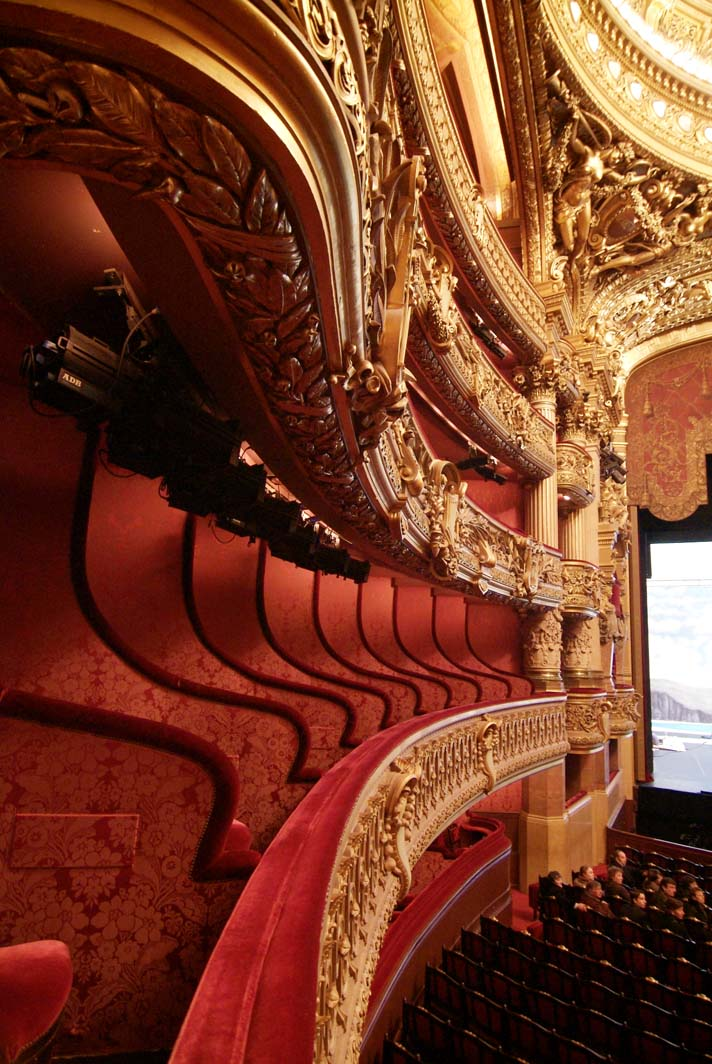 A balcony at the Garnier Opera House, Paris / Un balcon de l’opéra Garnier, à Paris